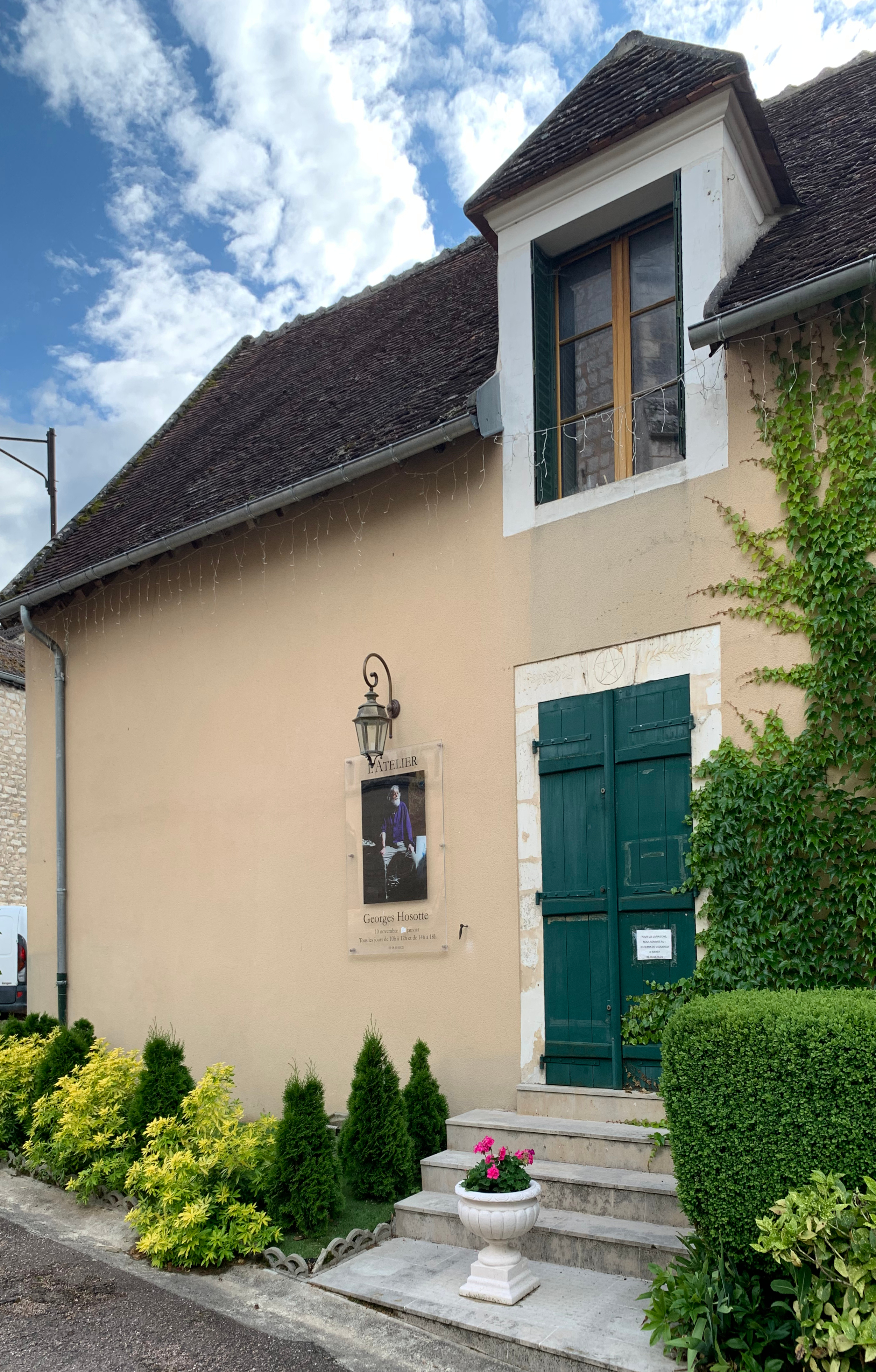 Georges Hosotte, rue de l'église (Irancy).